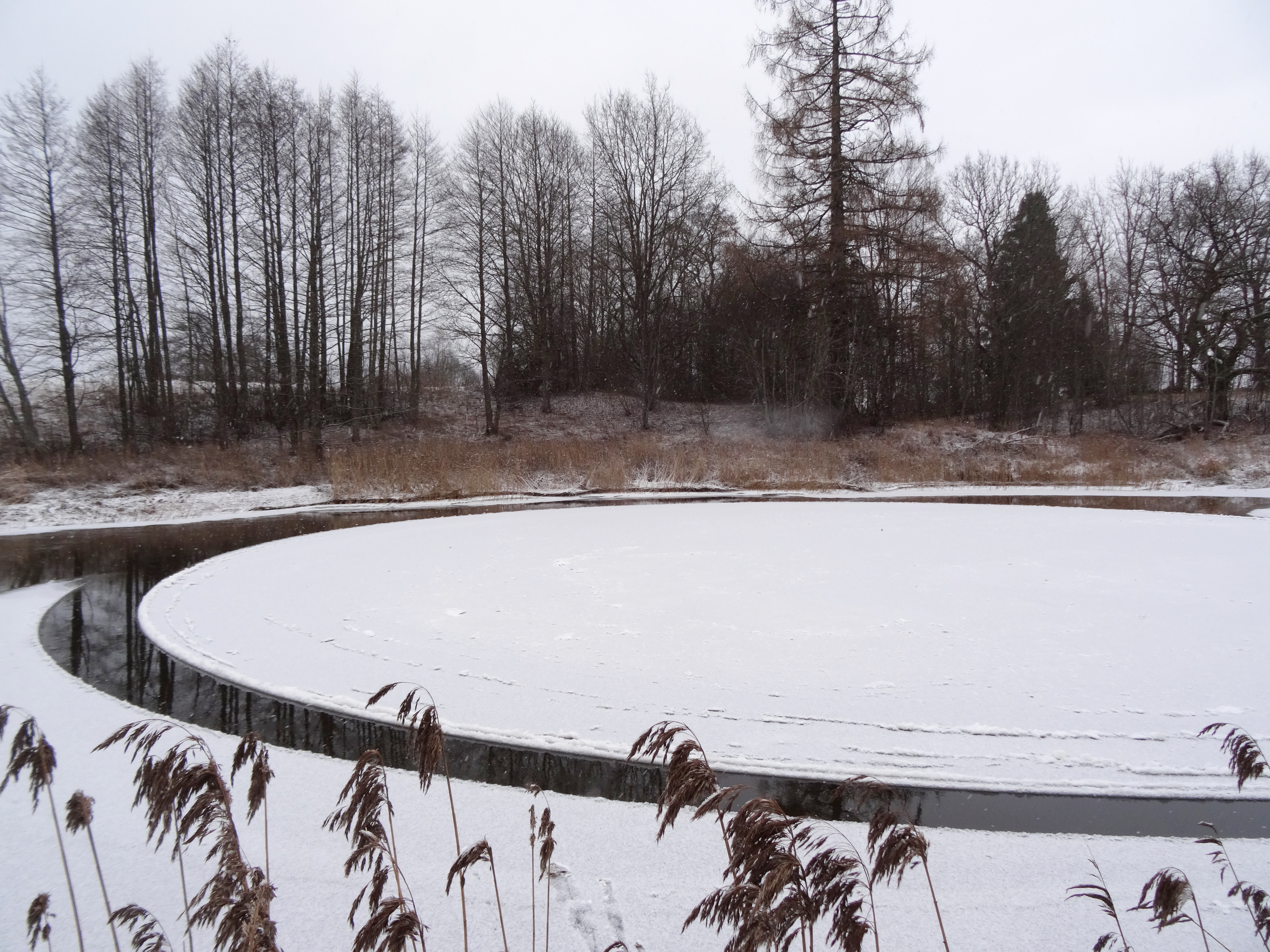 Vana-Vigala jääratas (Jaanuar 2016)